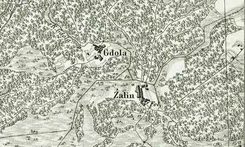 Gdola i Żalin (powiat chełmski) na mapie topograficznej Królestwa Polskiego z 1839 roku